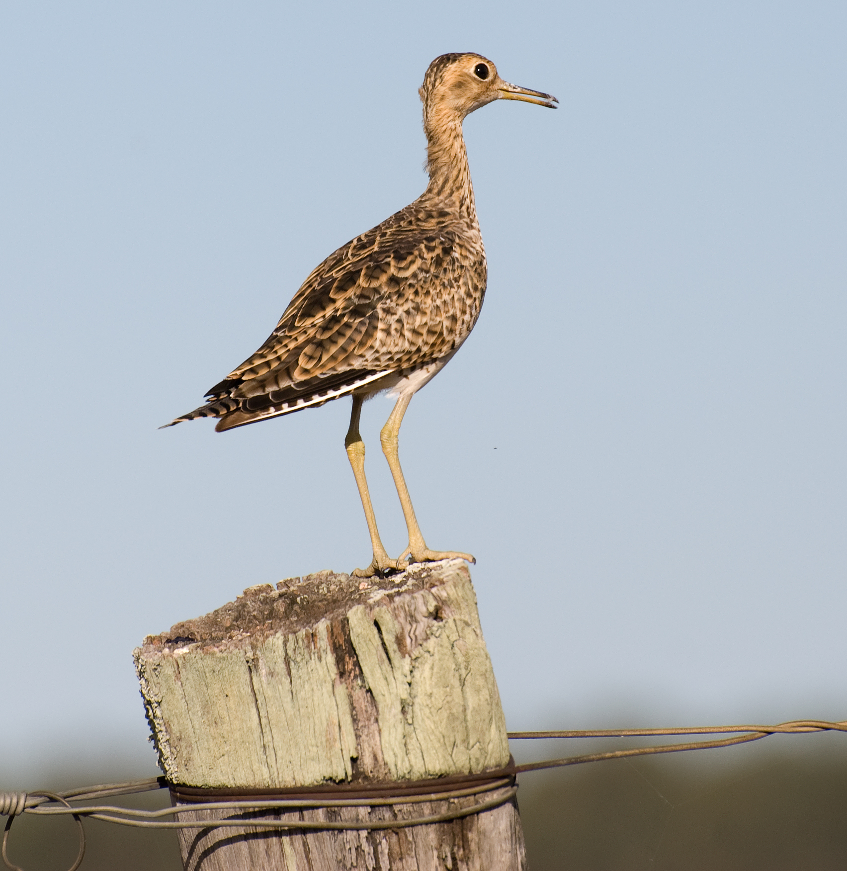 Batitú sobre poste de alambrado en el departamento de SALTO (Uruguay)